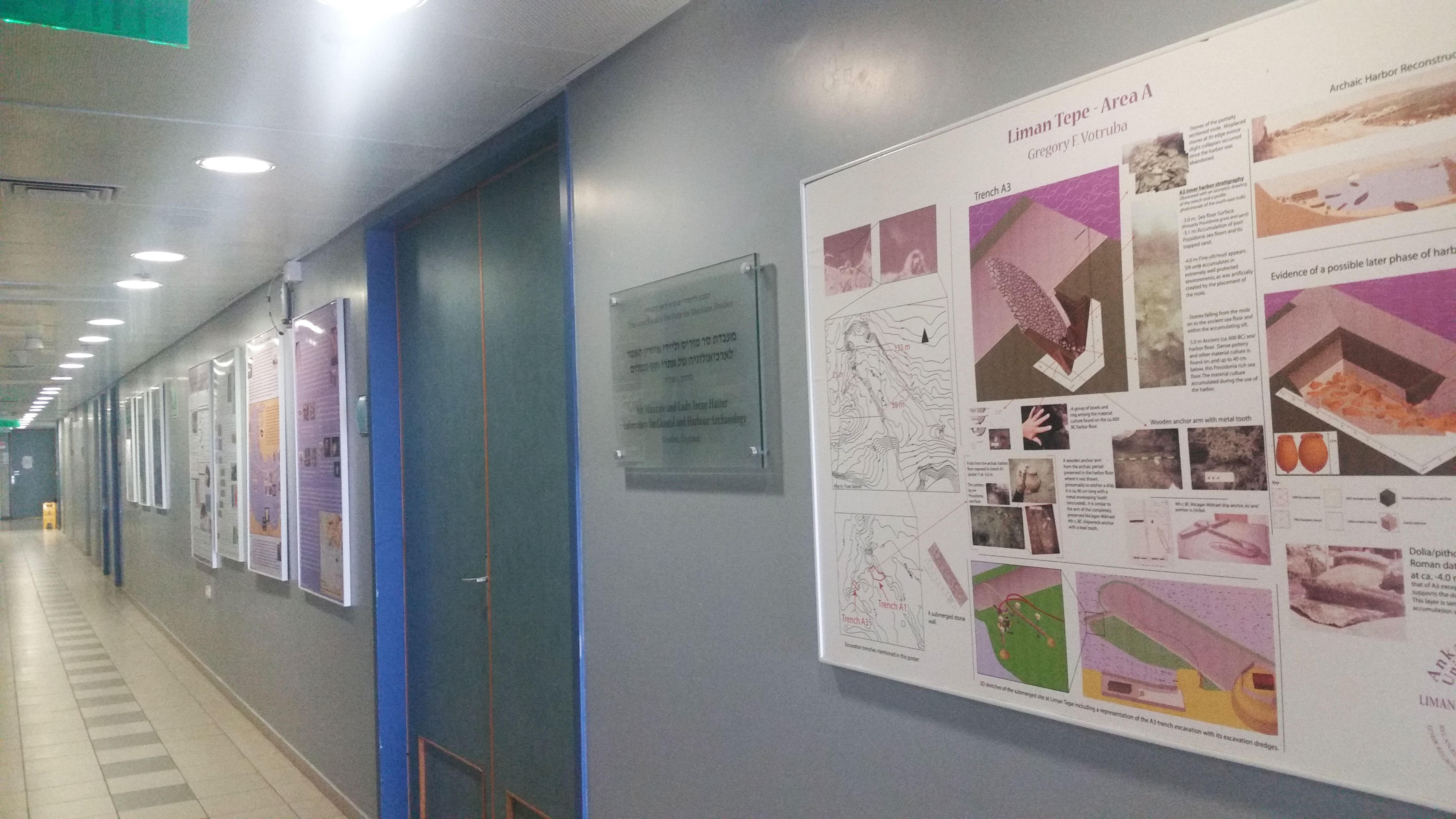 (מבנה המכון ללימודי ים ע"ש ליאון רקנאטי (בעבר- המרכז ללימודי ים באוניברסיטת חיפה. המכון הוא מכון מחקר בין תחומי ורב תחומי, הכולל חוקרים אשר עיקר התעניינותם המקצועית הקשר בין האדם וסביבתו הימית בעבר, בהווה ולקראת העתיד. המסדרון הפנימי במבנה שבו שוכן המכון